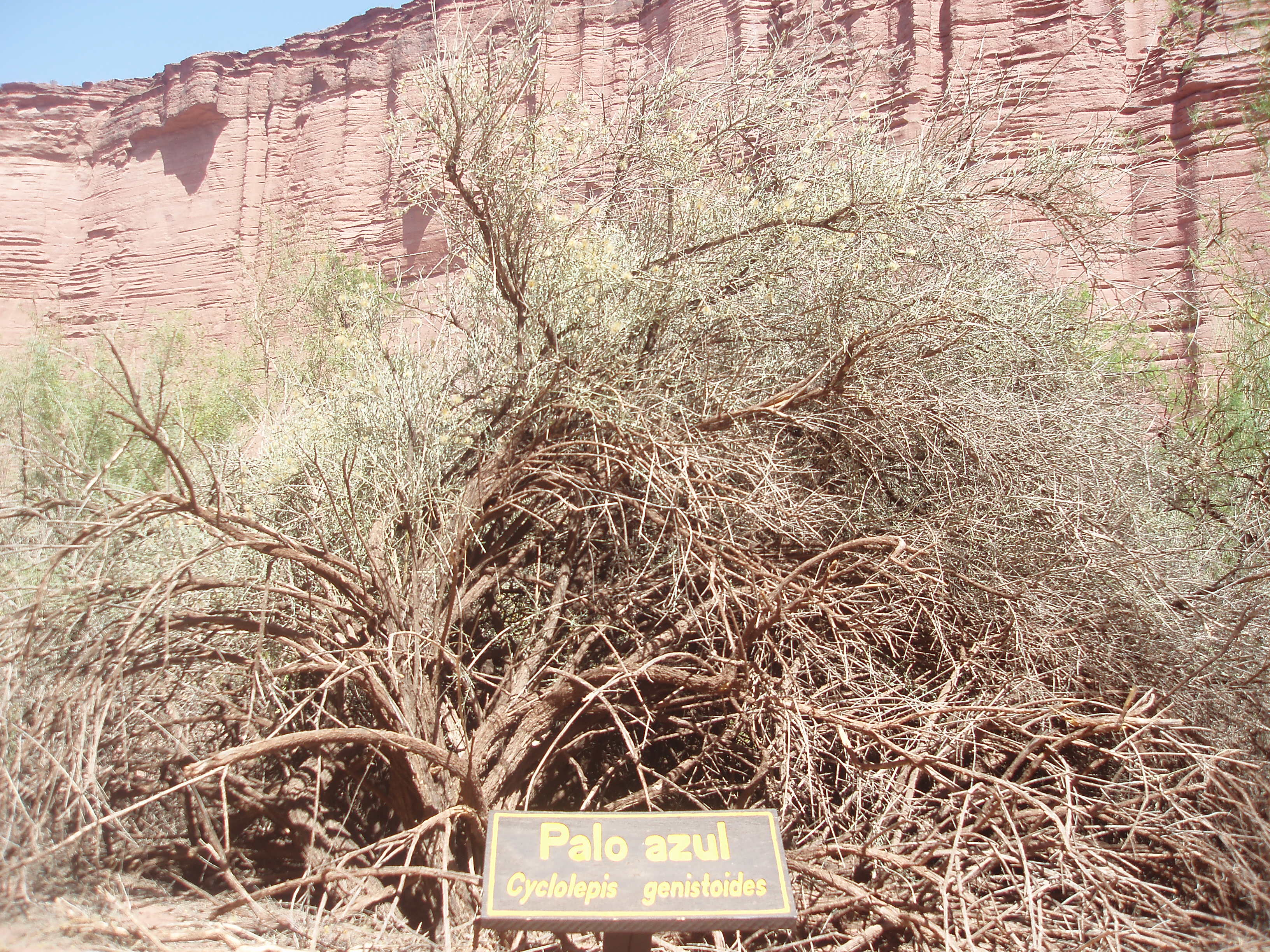 Cyclolepis genistoides, Parque Nacional Talampaya, Argentina